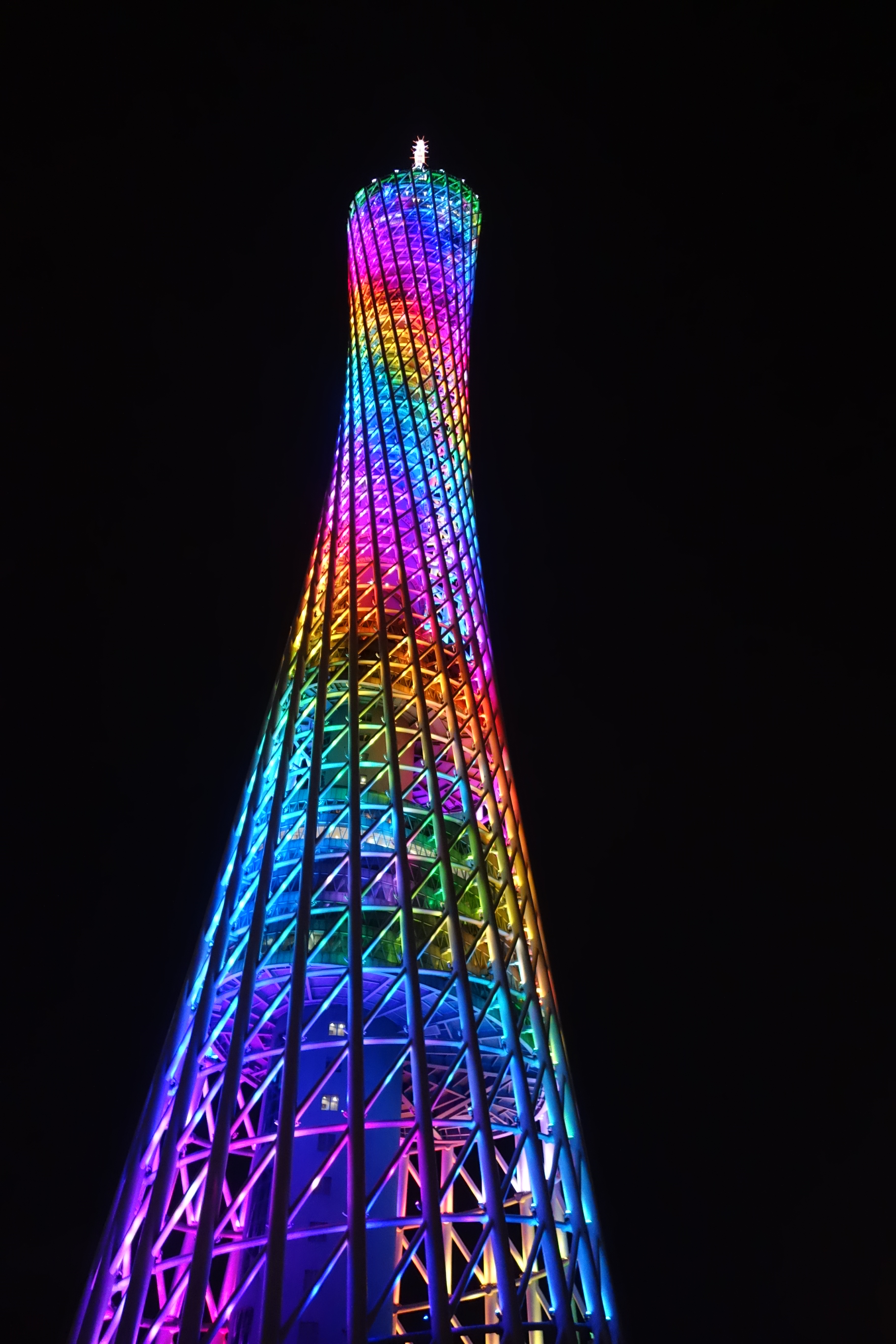 Canton Tower In The Evening, Guangzhou, China